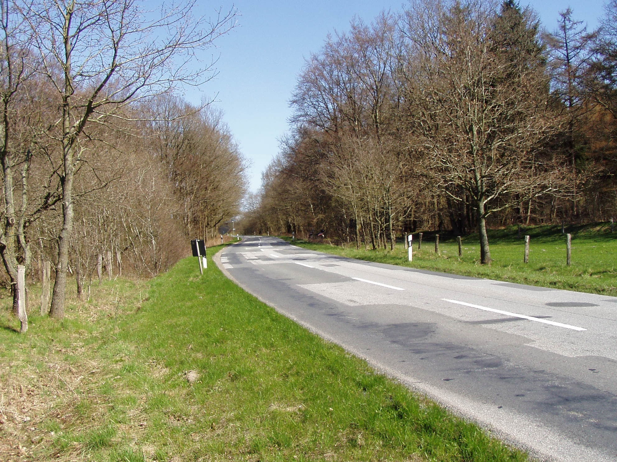 Straße "Neuholzkrug" - frühere Trasse nach Flensburg-Weiche